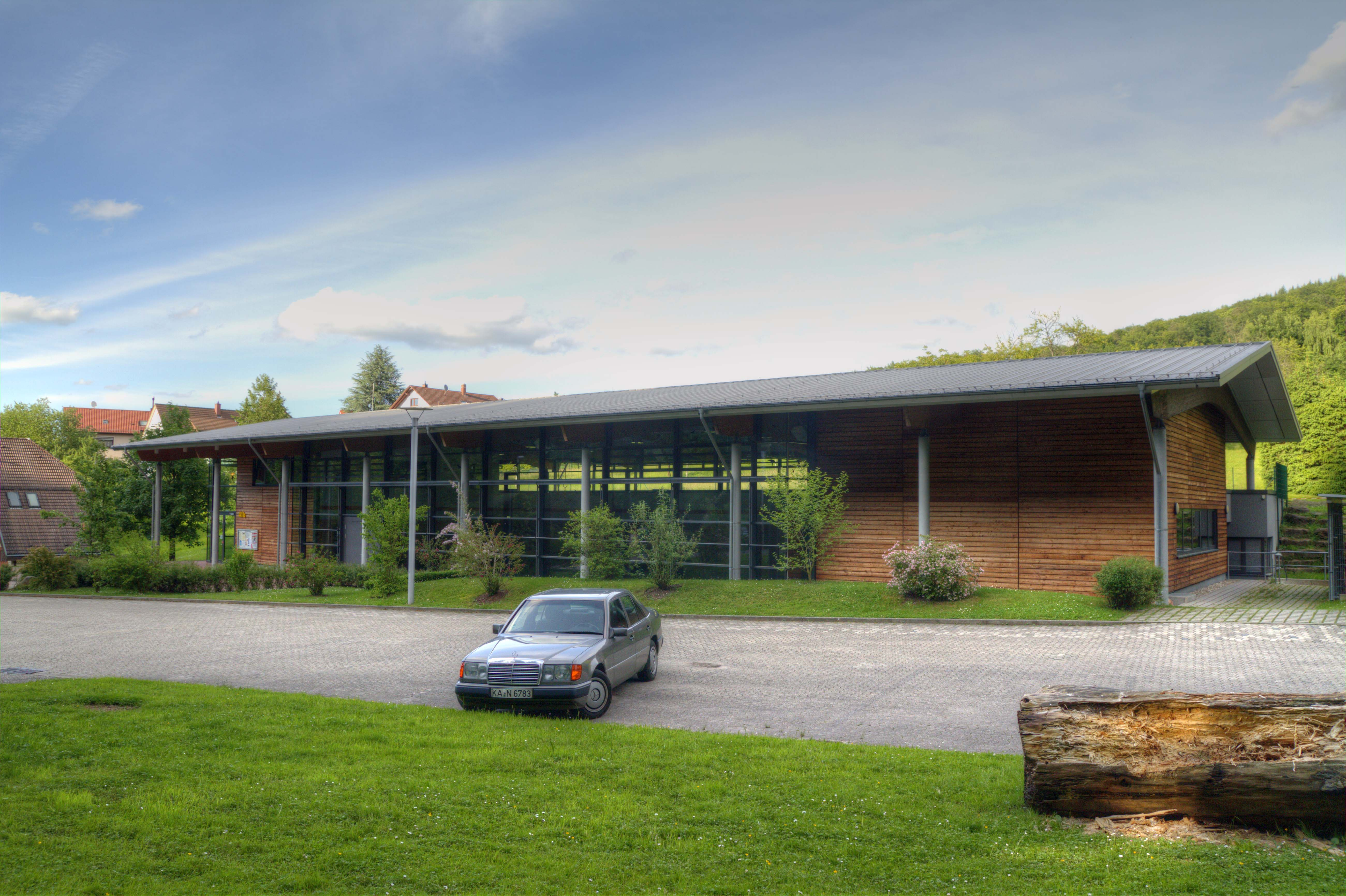 Die Mehrzweckhalle in Waldprechtsweier. Sie wurde in den Jahren 2003-2004 in der Talstraße von der Gemeinde Malsch erbaut.